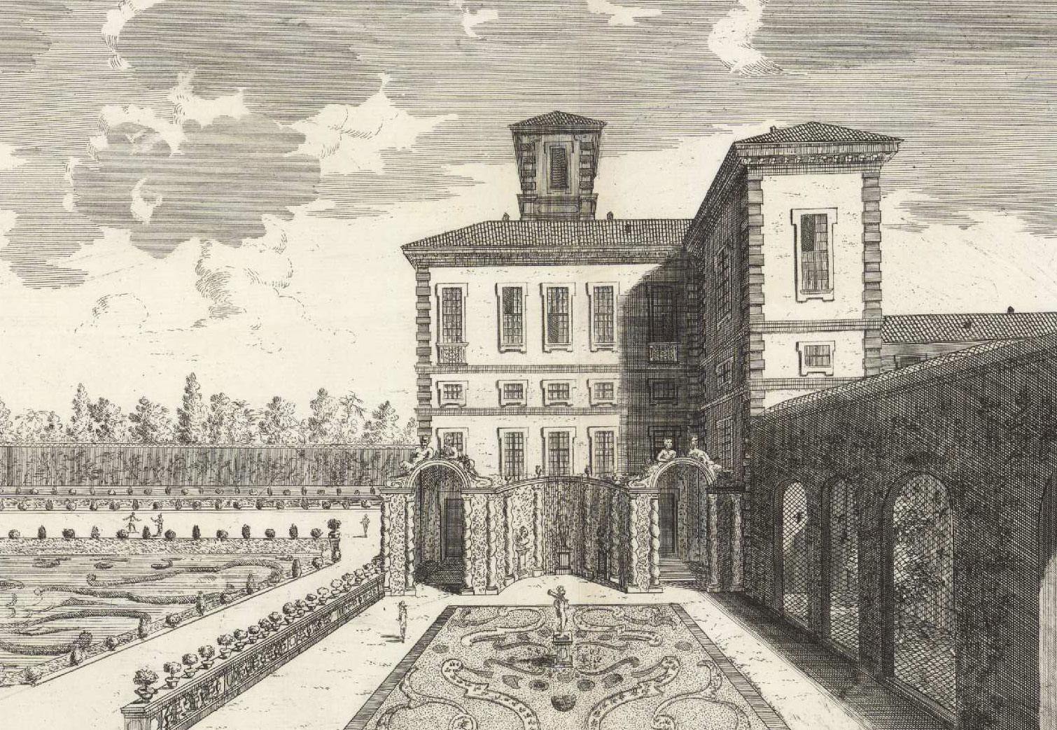 Veduta del teatro de’ Lauri della villa Silva a Cinisello.